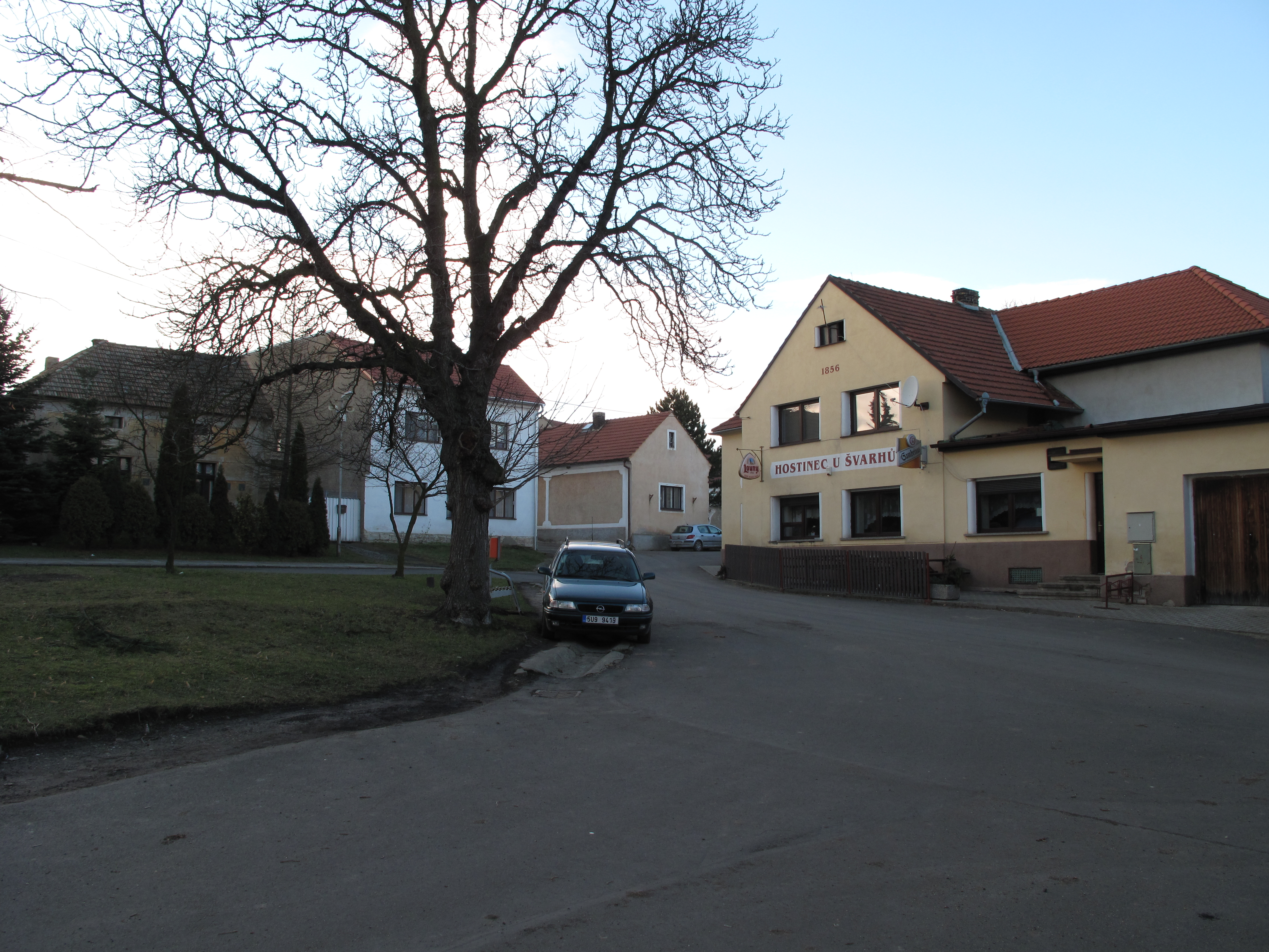 Hospoda v Evani. Okres Litoměřice, Česká republika.